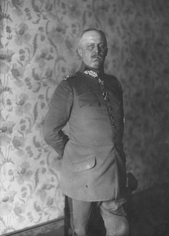 Erich Ludendorff Erich Ludendorff Generalquartiermeister [Porträt Erich Ludendorff, stehend] Abgebildete Personen: Ludendorff, Erich: 1865-1937, General, kaiserliches Heer, MdR, NSDAP, Tannenbergbund, Deutschland (PND 118574841)